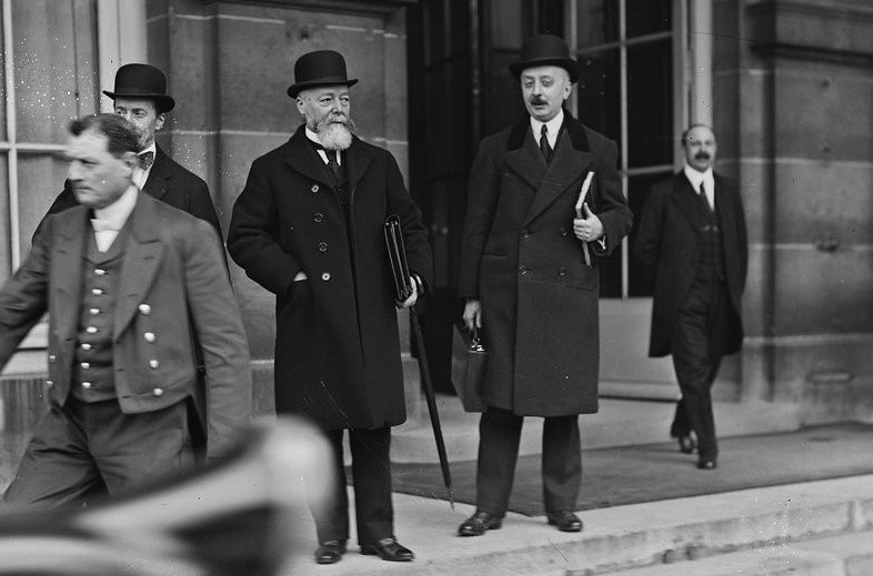 Paul Doumer, ministre des Finances français (au centre), au quai d'Orsay pour la conférence interalliée de Paris.